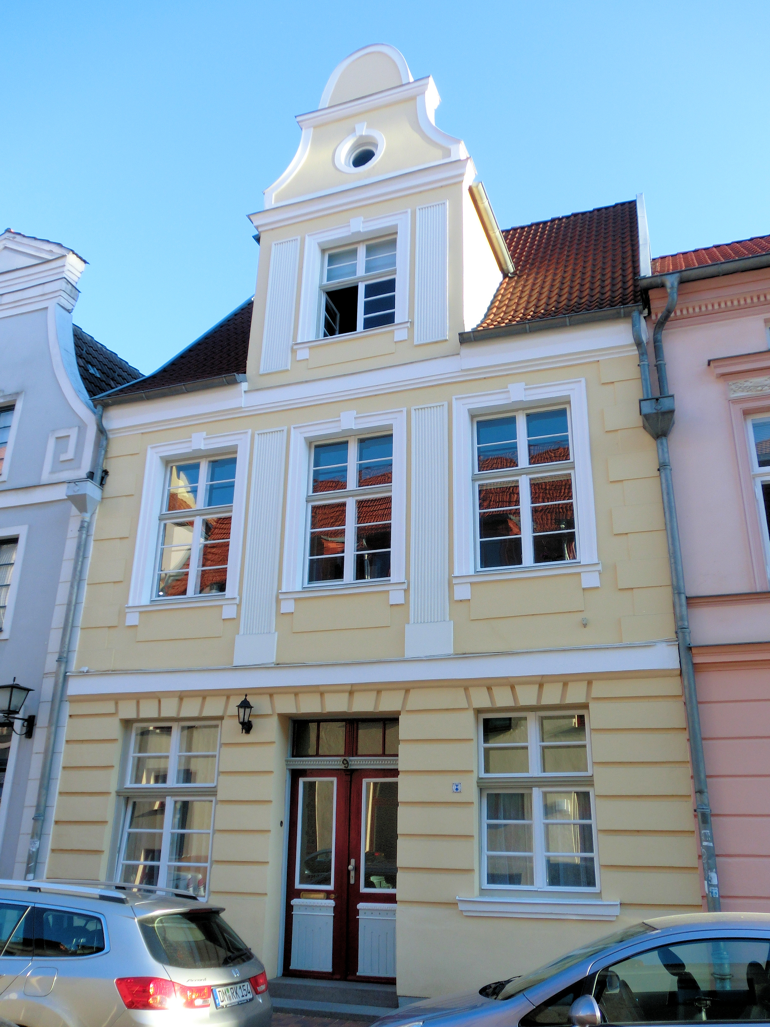 Rostock Hartestrasse 9 Baudenkmal